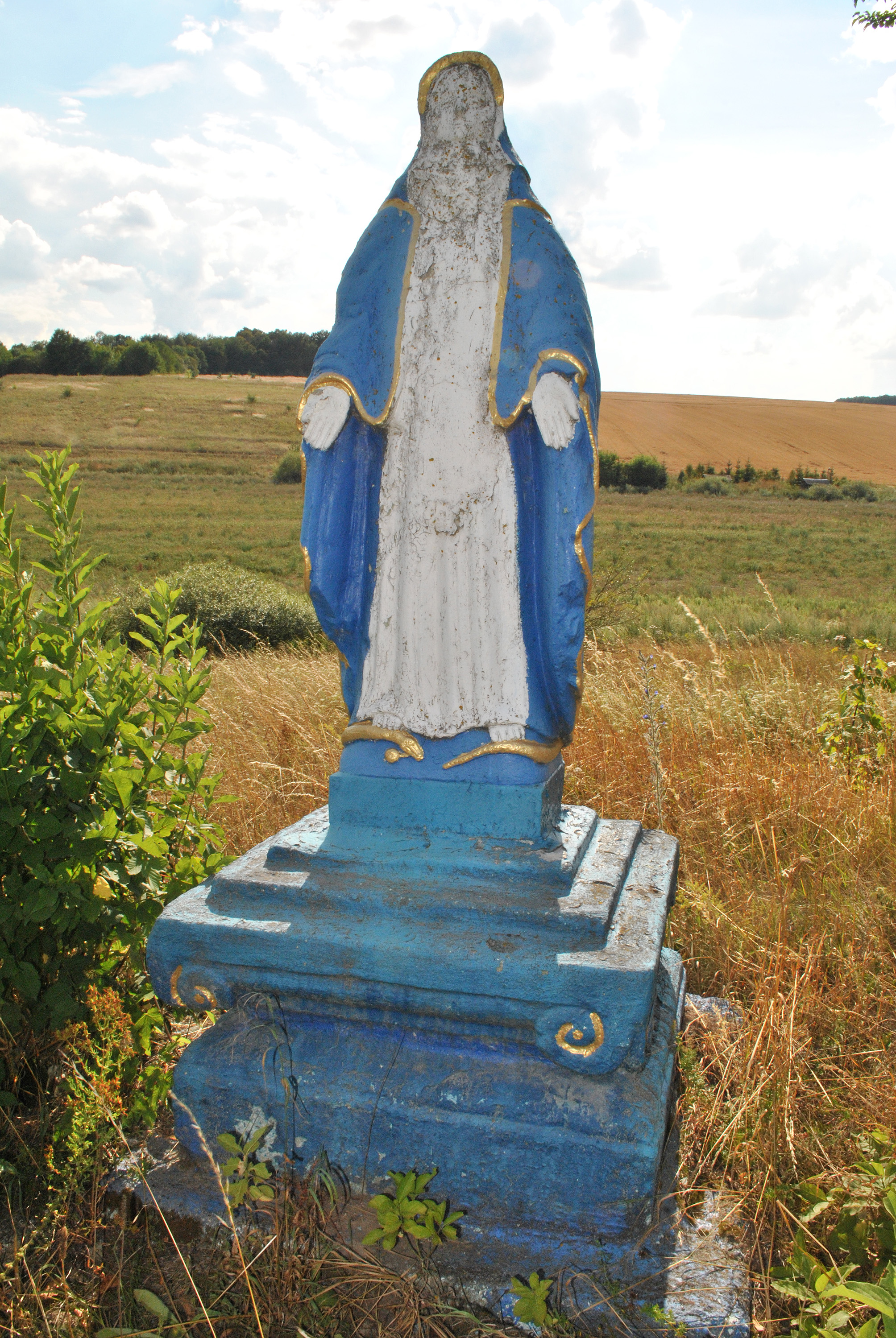 Фігура Матері Божої біля пам'ятного знаку на честь врятування дочки місцевого пана від вовків на межі сіл Петриків, Острів та смт Велика Березовиця Тернопільського району Тернопільської області.